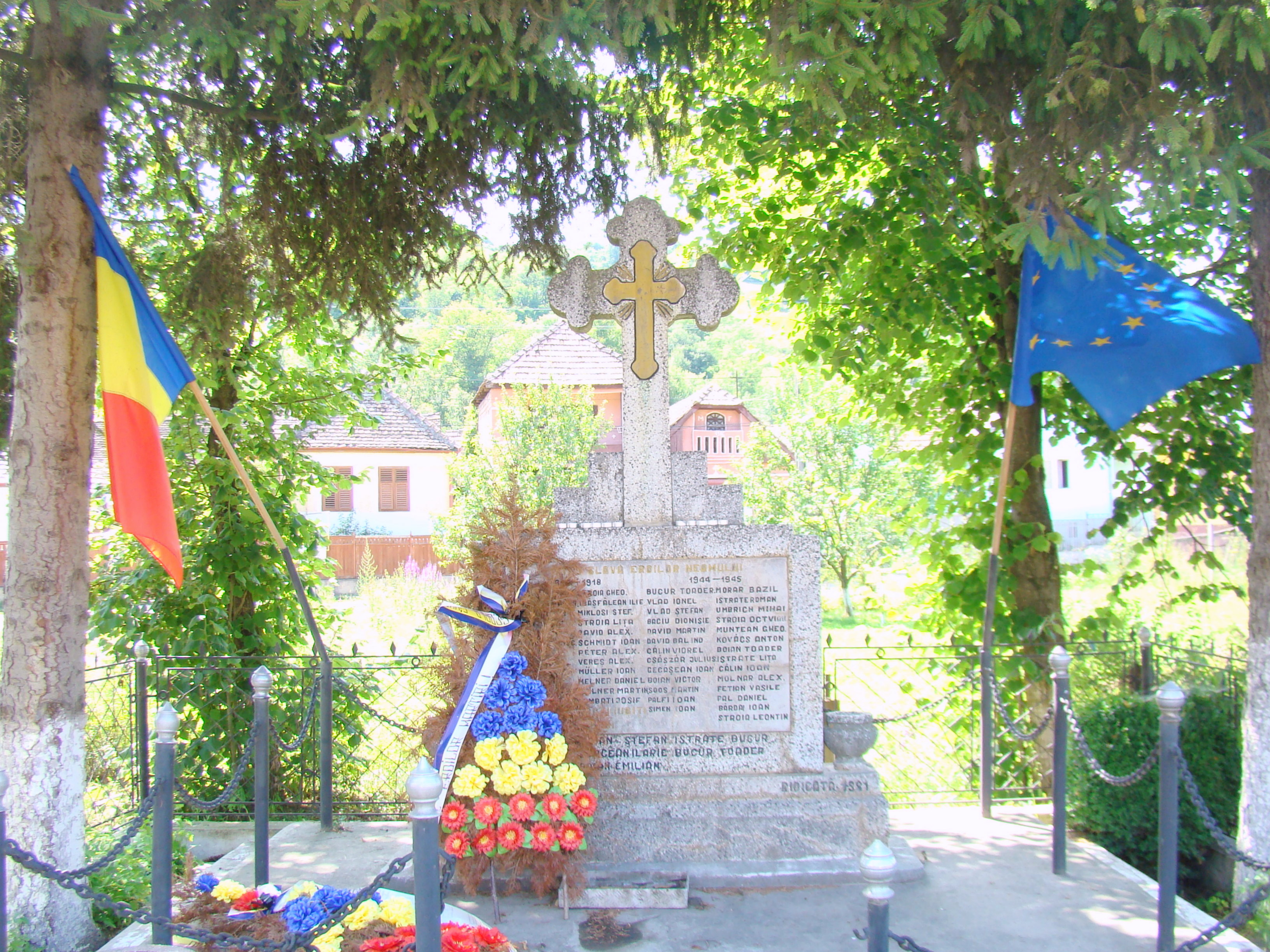 Monumentul eroilor din satul Şmig, comuna Alma, judeţul Sibiu